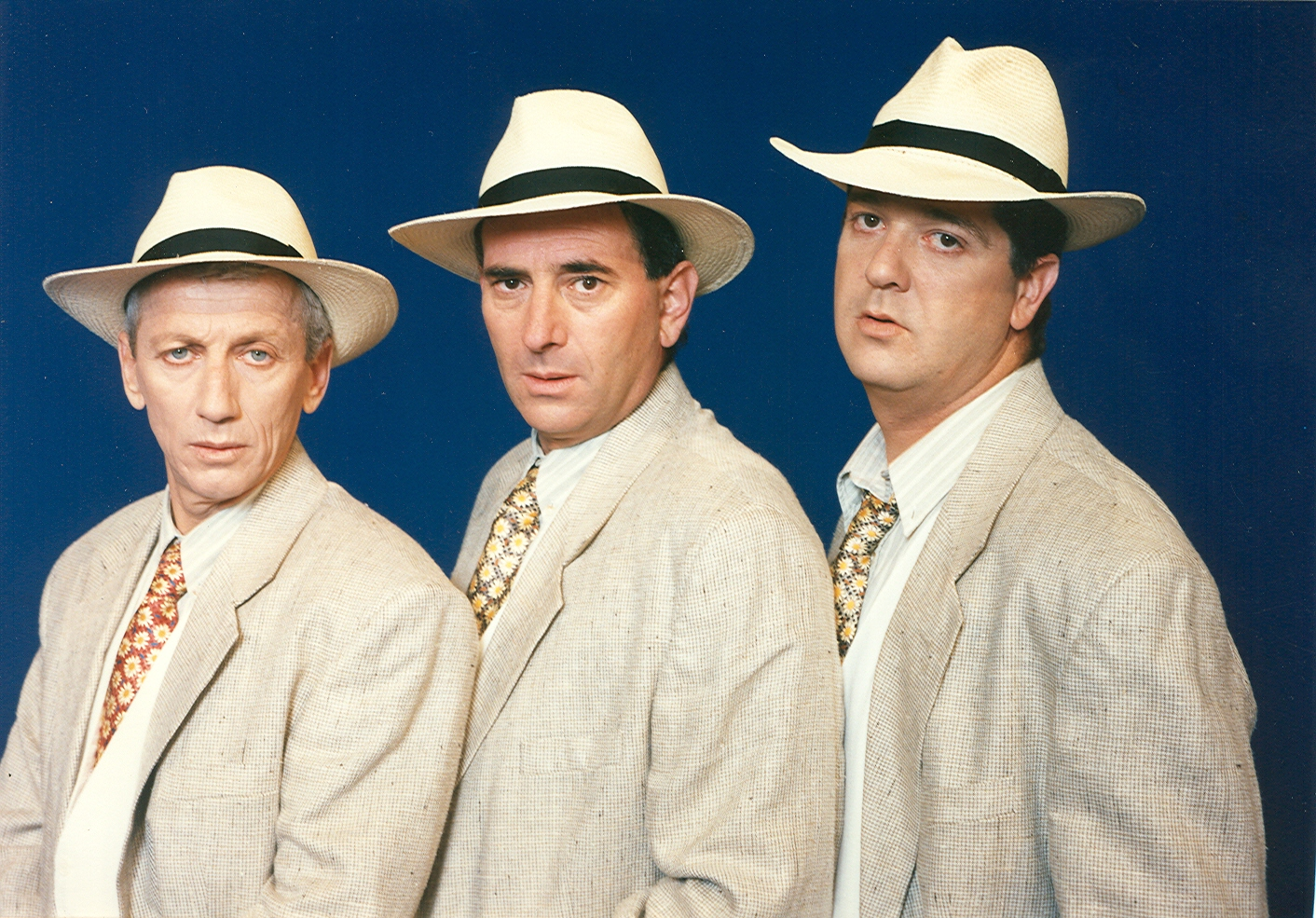 המופע של זהו-זה" ששודרה בערוץ 2 אבי קושניר דב'לה גליקמן ומוני מושונוב